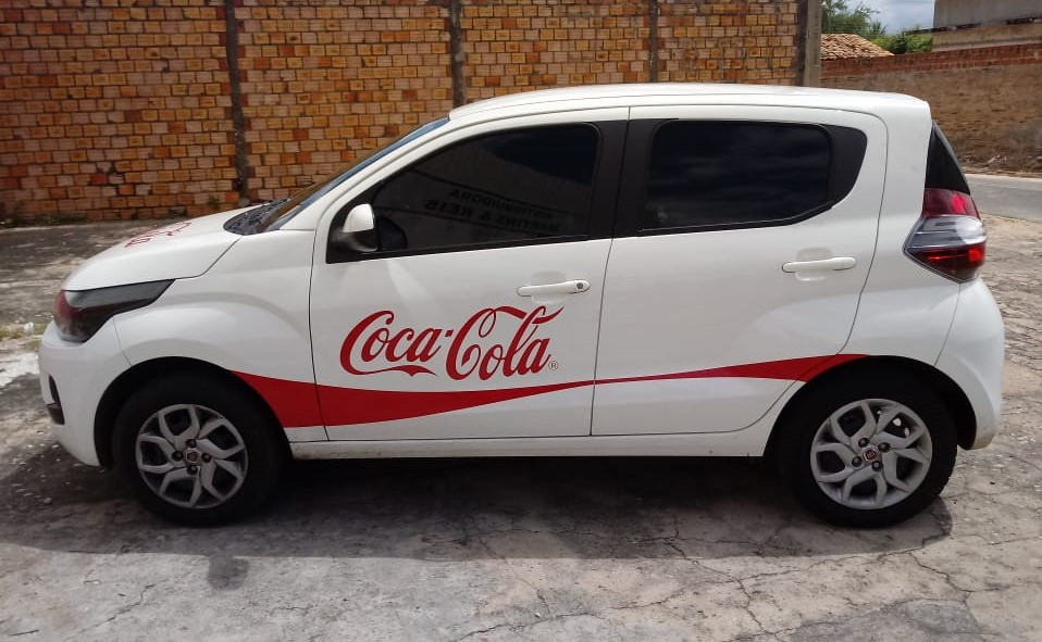 Fiat da Coca Cola em Campo Maior, Piauí, Brasil.